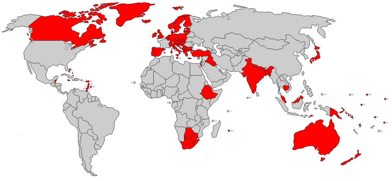 Státy - červeně jsou vyznačeny parlamentní demokracie, kde mají jednotlivé zastupitelské sbory nemalé pravomoci ve srovnání s prezidentskými republikami, či jinými formami vlády